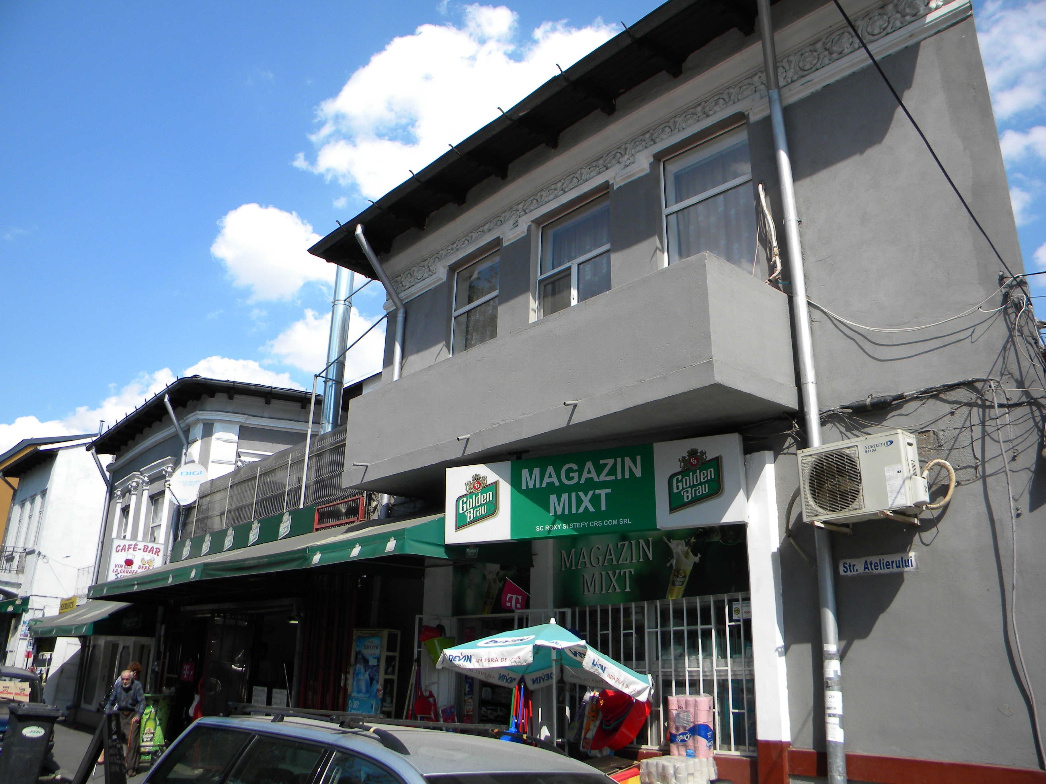 Bucuresti, Romania, Str. Atelierului nr. 14, sect. 1; B-II-m-B-18007